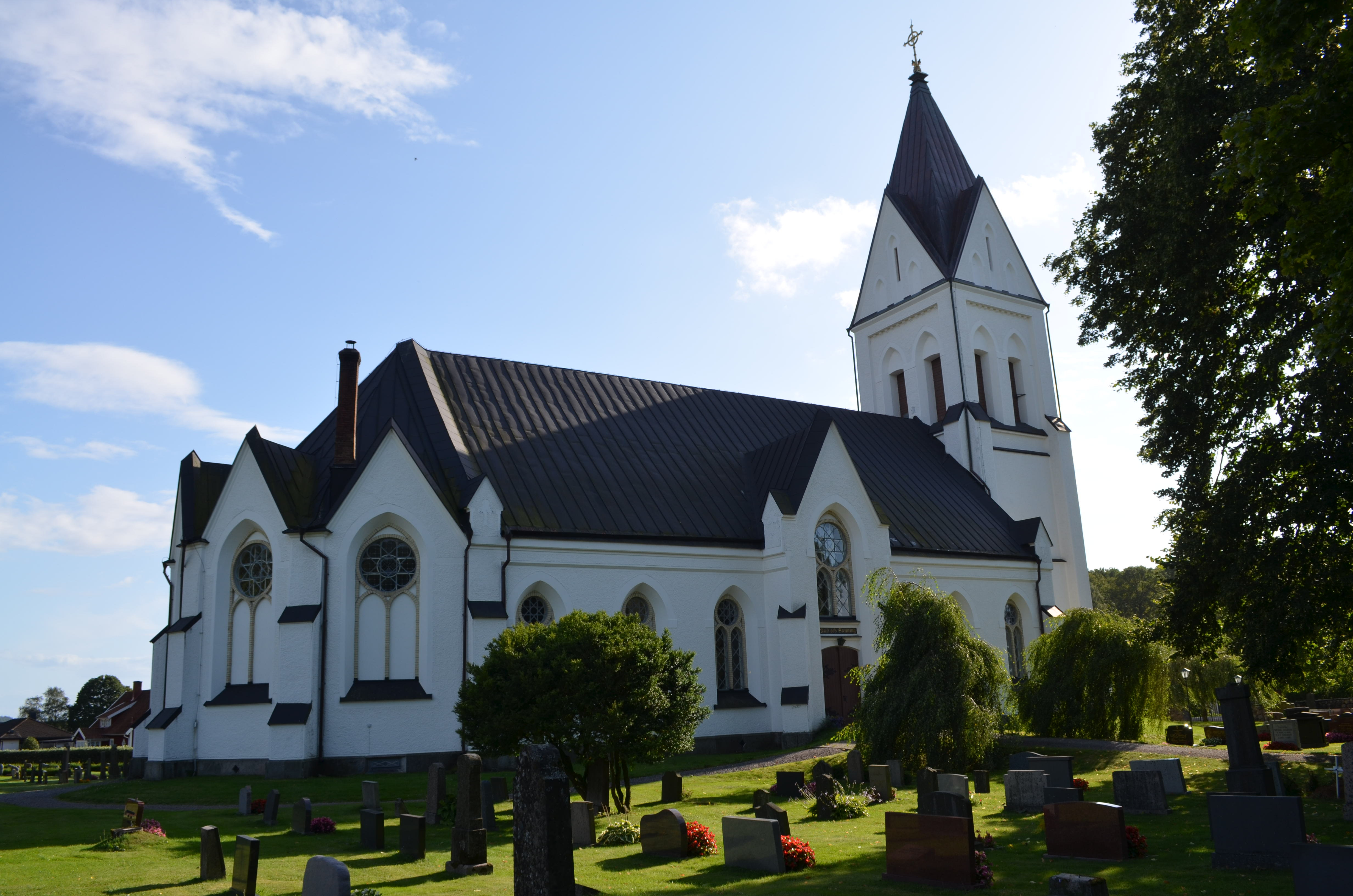 Okome kyrka i närbild.